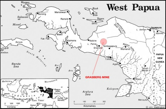 West Papua - Grasberg Mine